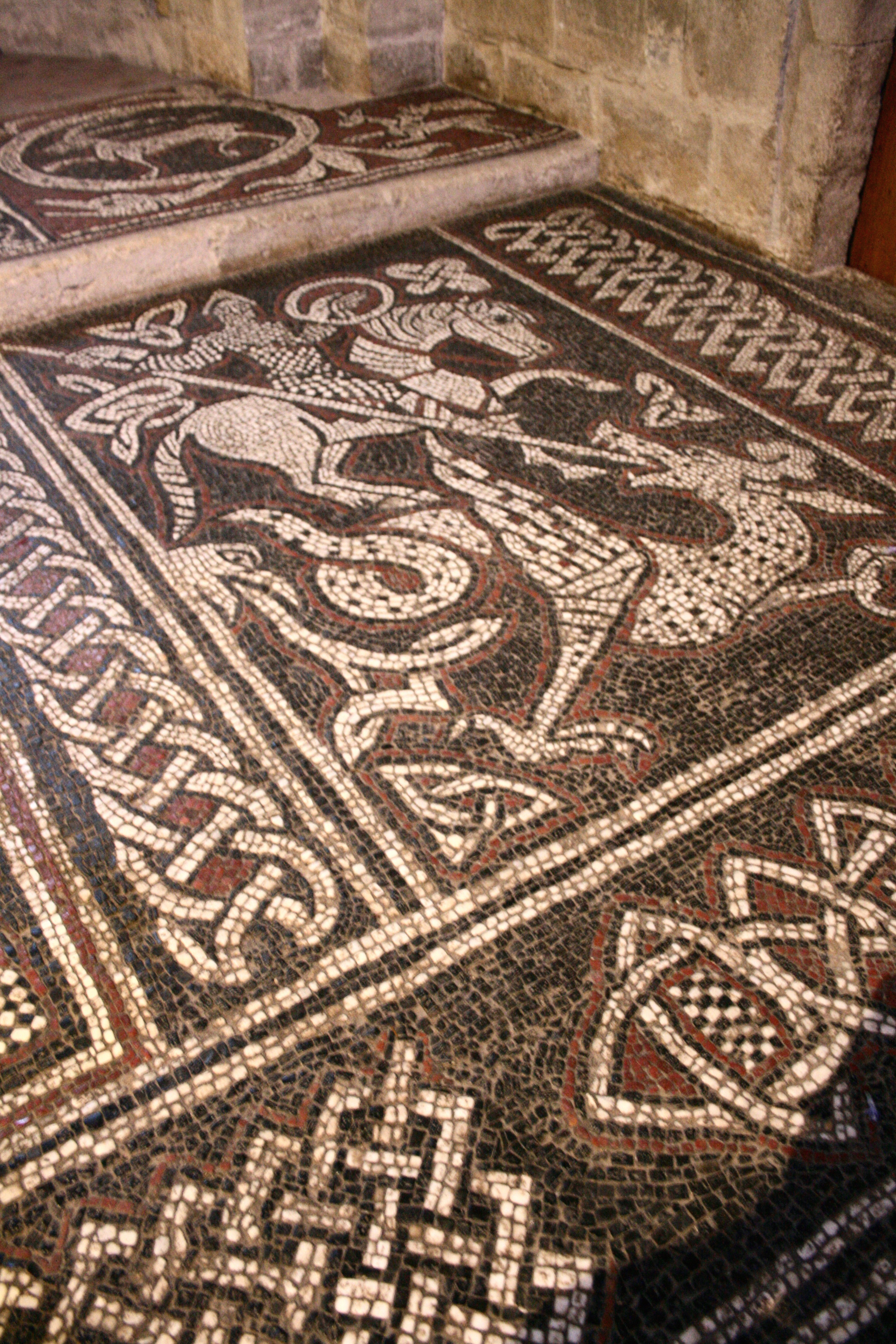 Prieuré de Ganagobie, département des Alpes de Haute-Provence. Eglise Notre-Dame (XIIe siècle). Intérieur: mosaïque romane du transept (1122 à 1129)